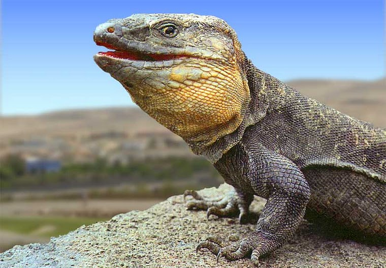 Gallotia Stehlini al bioparco Darwin